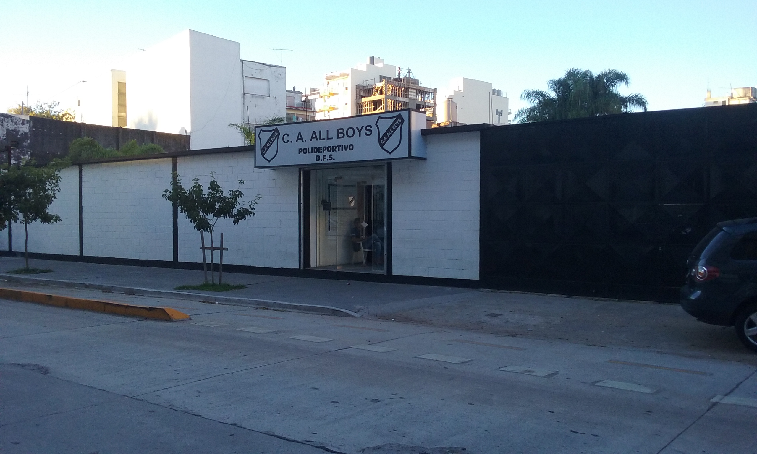 Fotografía del Predio Don Fernando Sánchez tomada con mi Samsung Core Prime Duo LTE